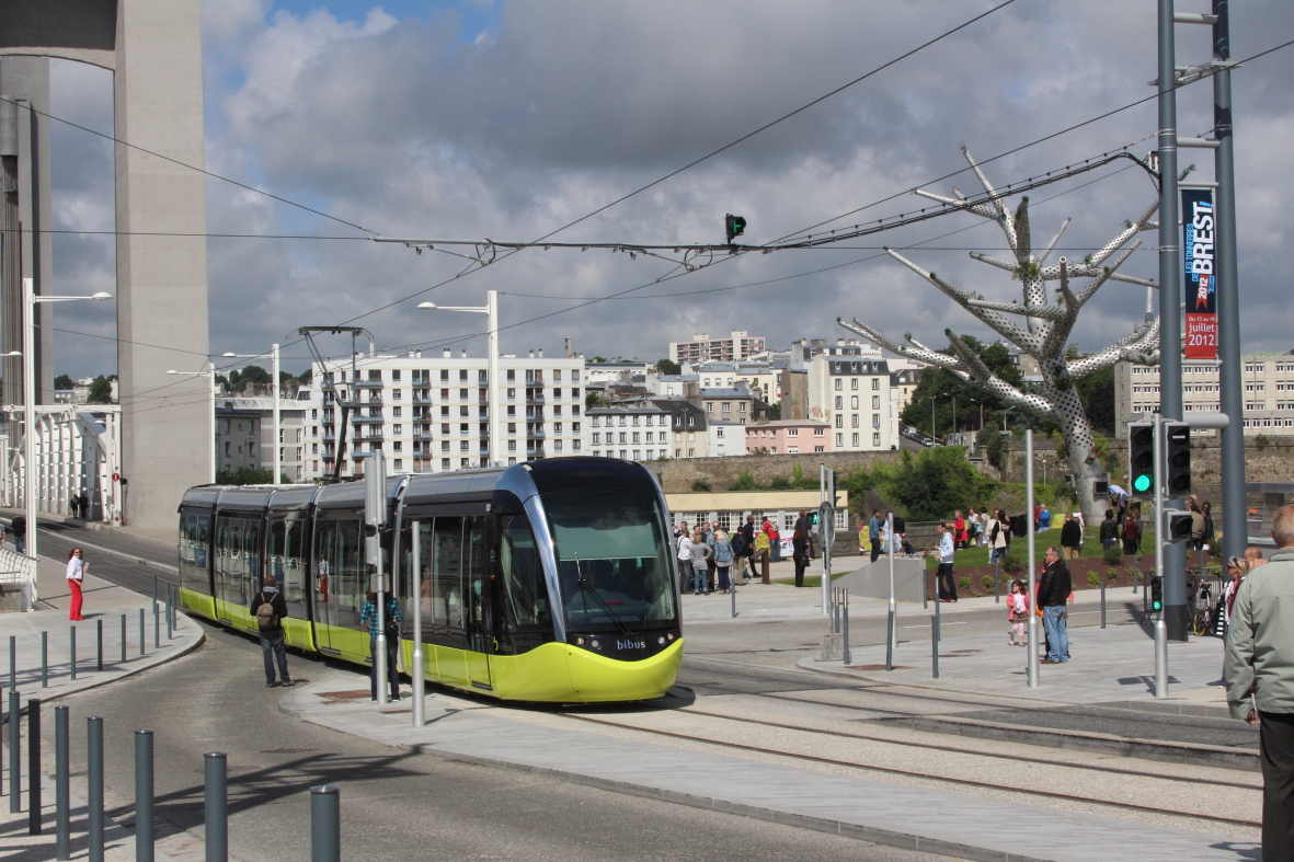 Une des premières rames vient de franchir le pont de Recouvrance.